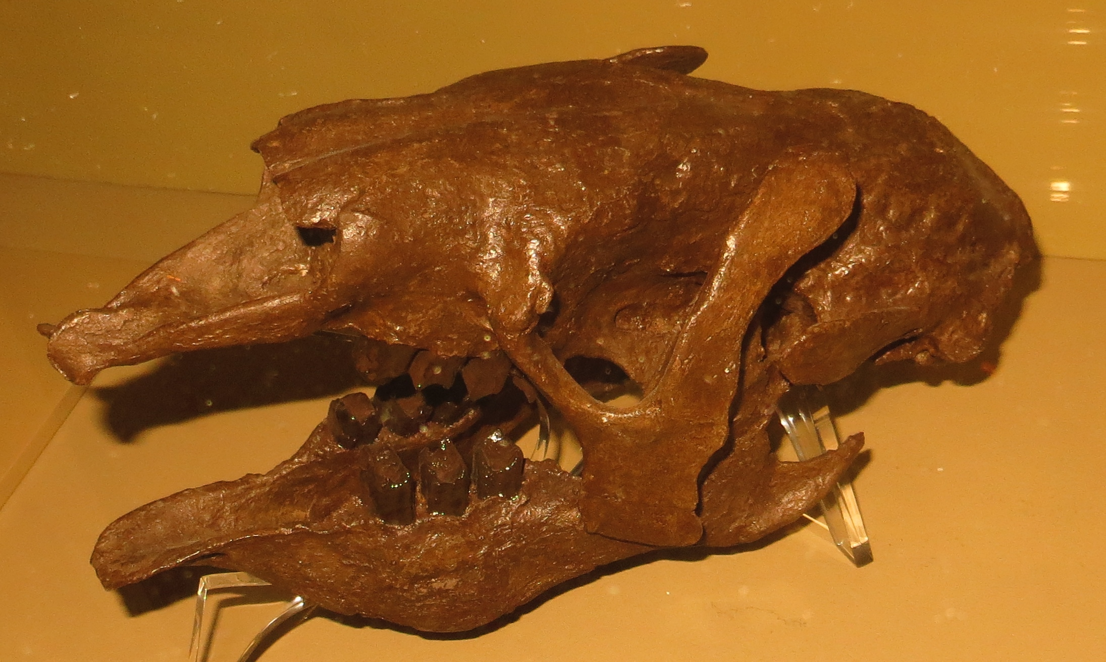 Fossil - Took the picture at Museum of Natural History, Karlsruhe